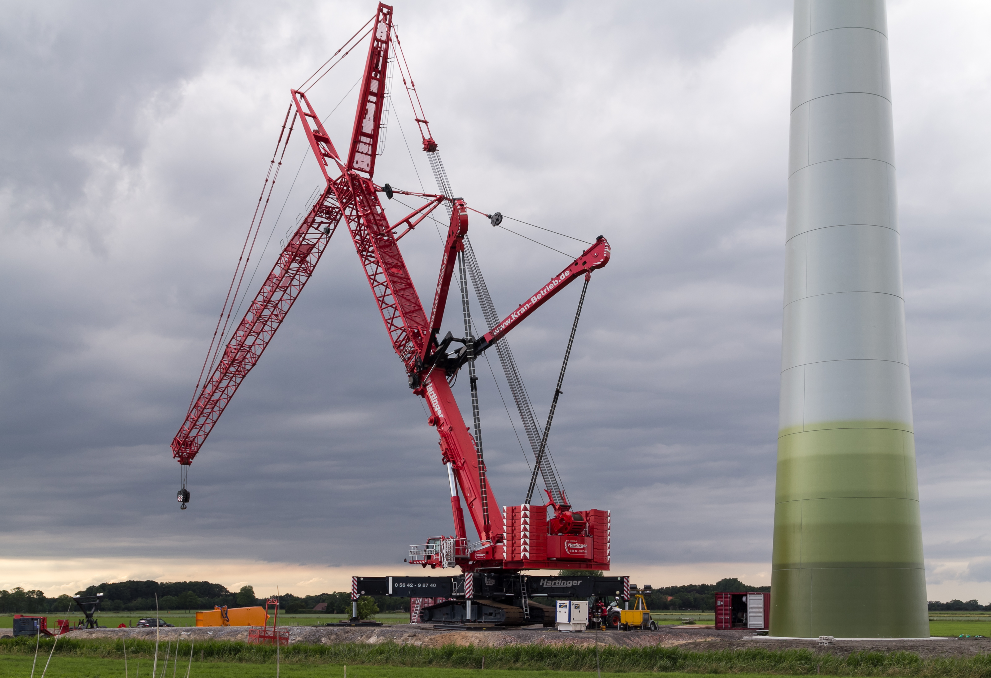 Raupenkran Liebherr LTR 11200 beim Aufstellen einer Windkraftanlage südlich Varel/Jadebusen